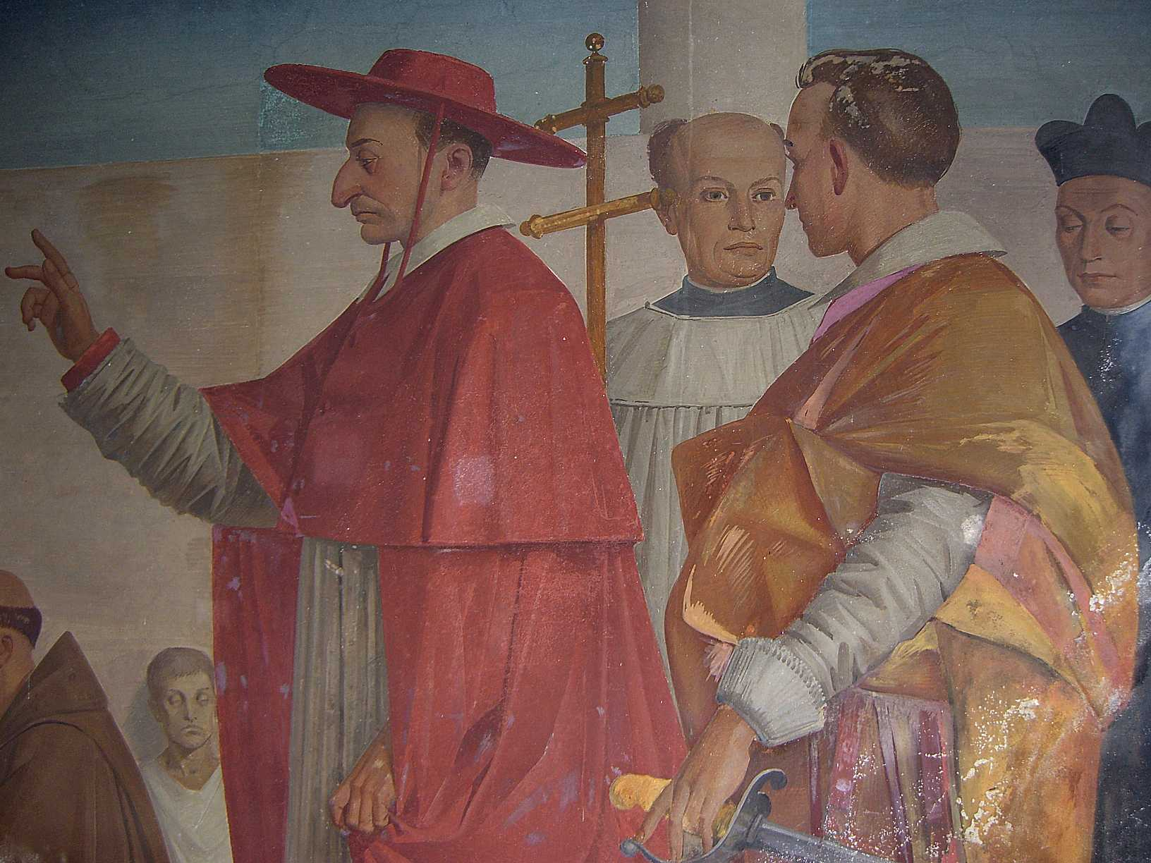 MB Villasanta cappella di San Rocco San Carlo Borromeo in visita a Villasanta nel 1578 - affresco